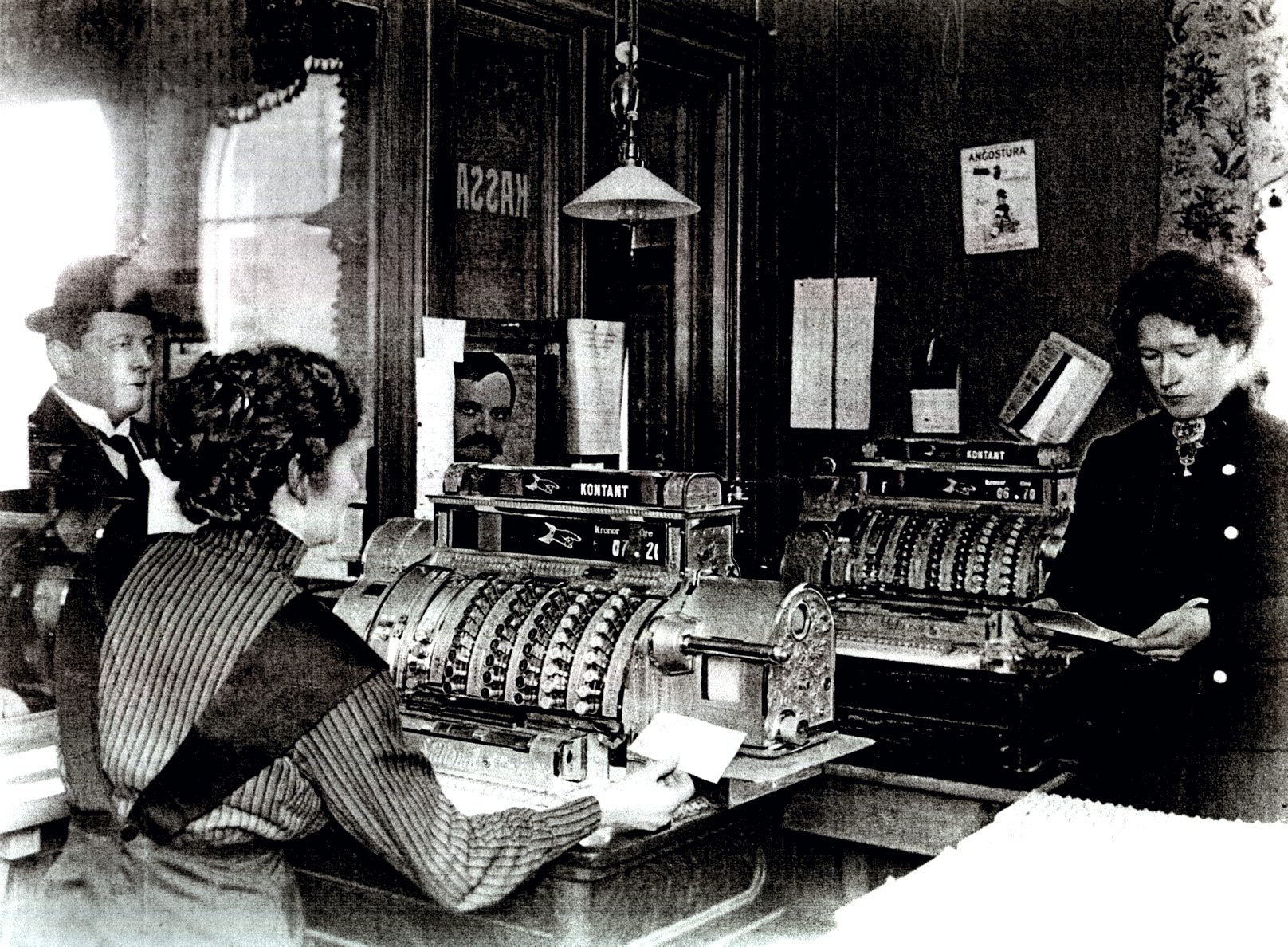 Systembolaget i Växjö där direktör Gottfrid Åstrand (1866-1924) tittar in genom kassaluckan till kassörskorna Selma Berglund och Anna Lund.